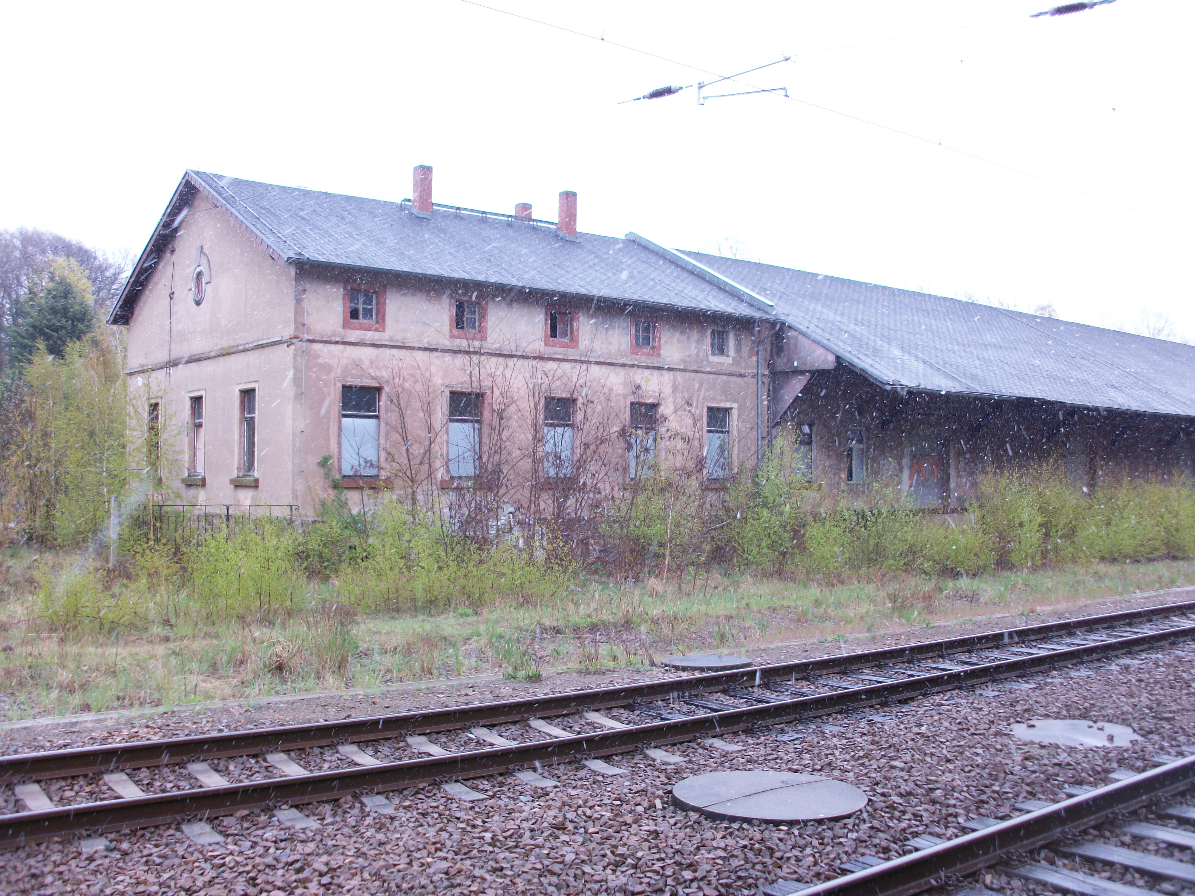 Waldheim, Güterbahnhof (2016)